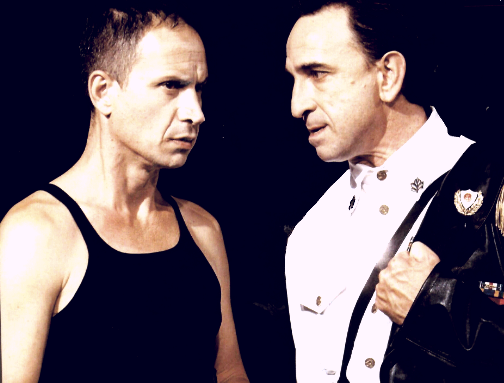 אוהד שחר ורפי אדיר בהצגה צור וירושלים